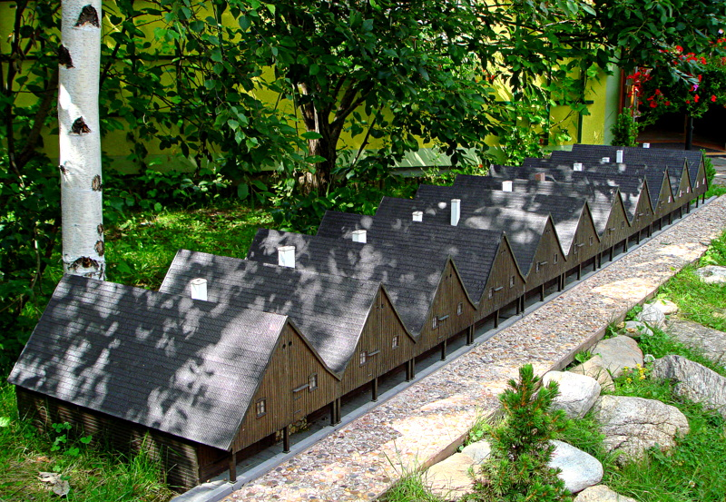 domy, 12 Apostołów, drewn., 1707 Chełmsko Śląskie, ul. Sądecka 13-23, Lubawka